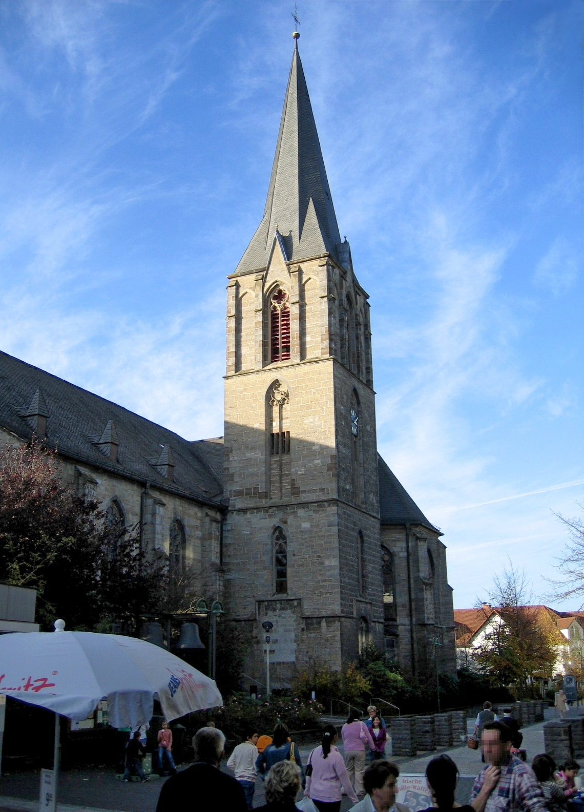 Katholische Pfarrkirche St. Johannes (1899, Erweiterung: 1935) in Sundern.